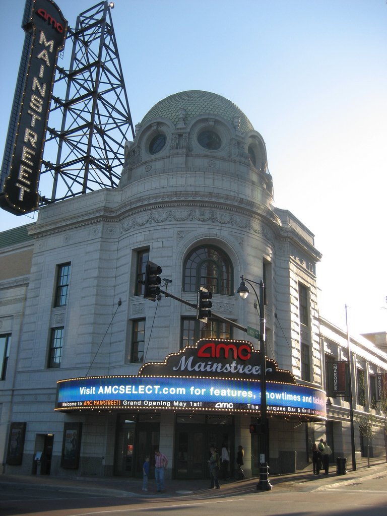 AMC 003